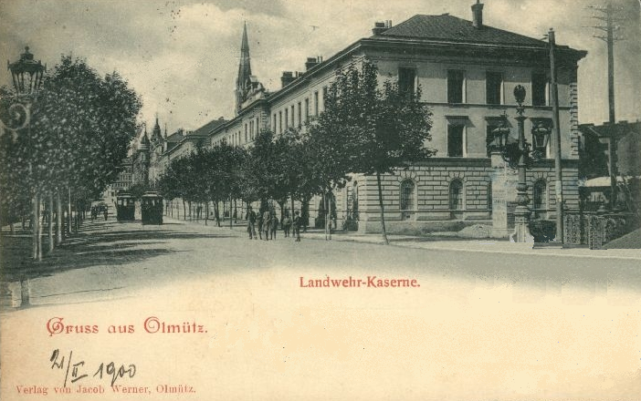 k.k. Landwehr-Kaserne in Olmütz